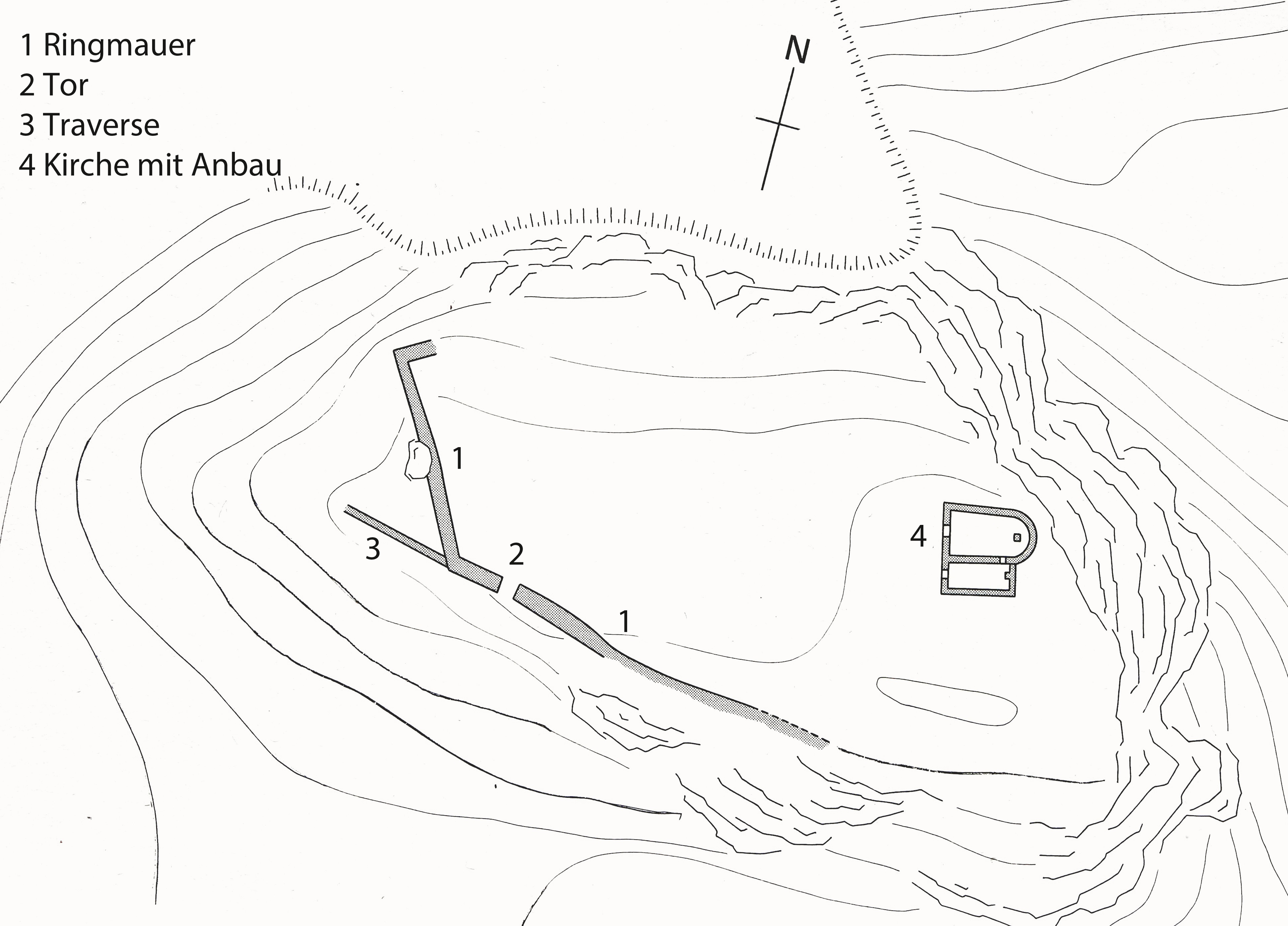 Plan